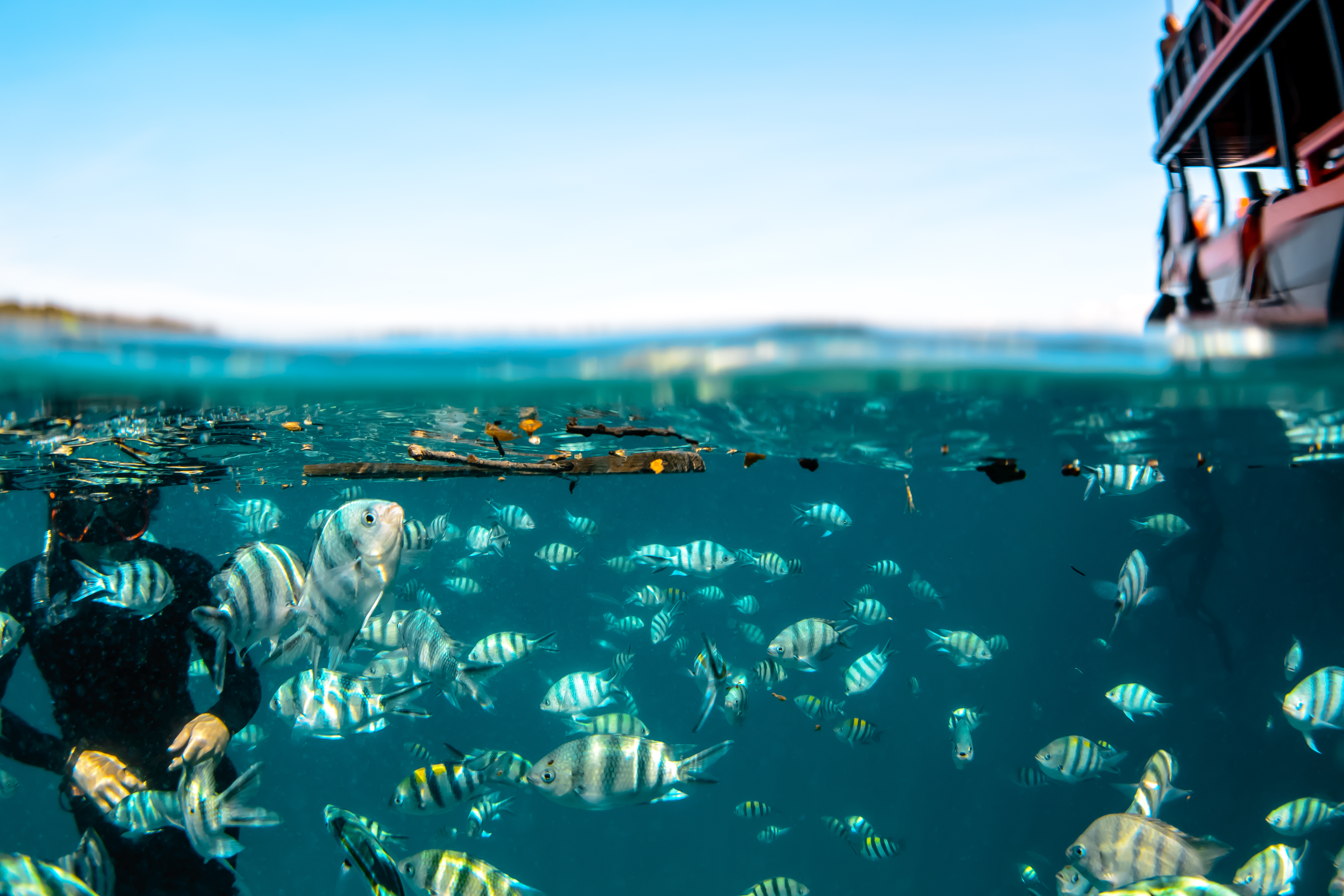 อุทยานแห่งชาติหมู่เกาะช้าง